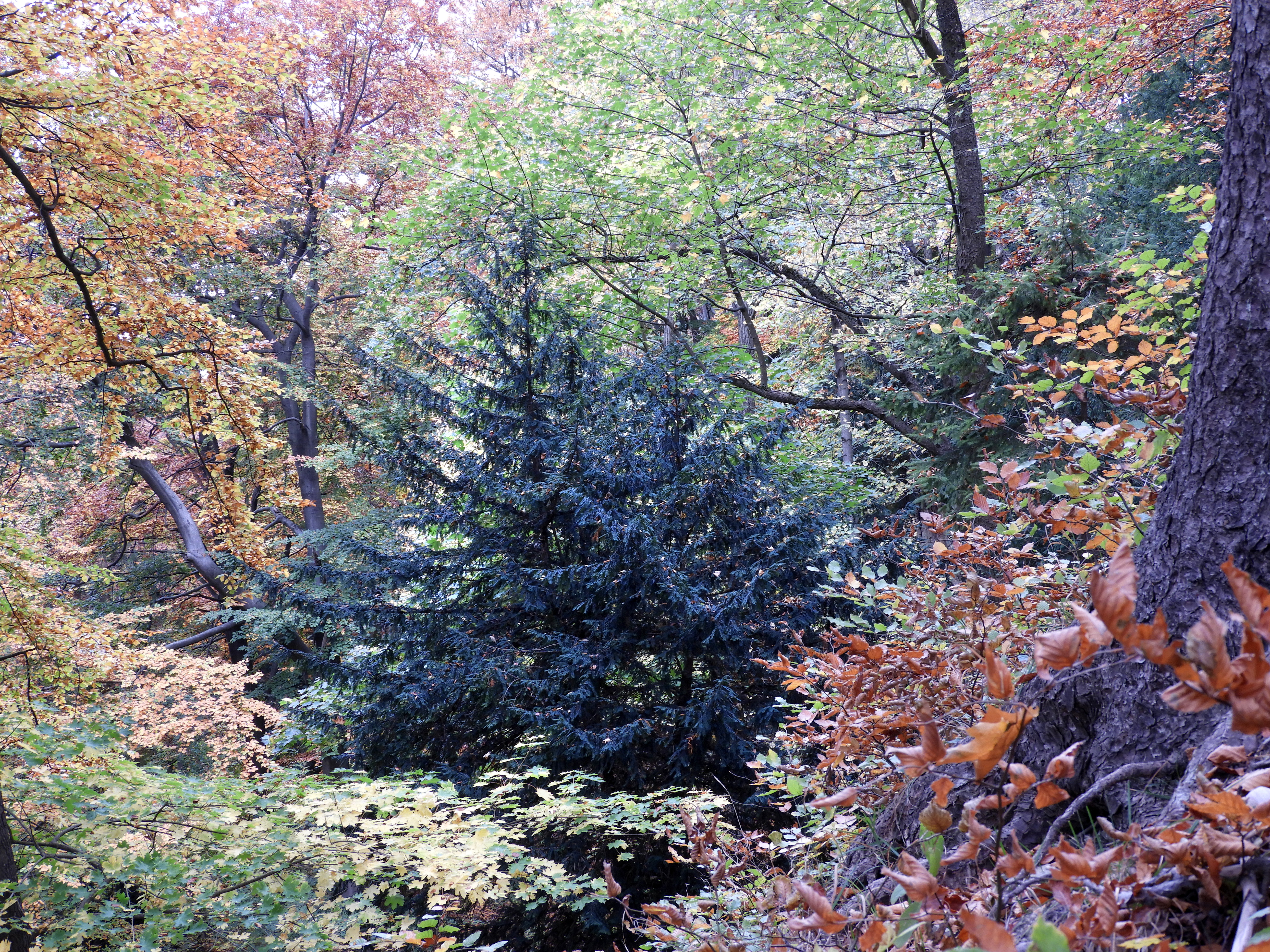 Der Name Iberg wurde von der Eibe abgeleitet, die sich bis heute in der Region erhalten hat. In Deutschland steht die einzige natürlich vorkommende, heimische Nadelbaumart auf der Roten Liste der gefährdeten Arten und wird nach dem Bundesnaturschutzgesetz besonders geschützt, da ihr Bestand im Laufe der Jahrhunderte stark dezimiert wurde. Im Kreisgebiet und im benachbarten Eichsfeld hat sie eines der landesweit bedeutendsten Vorkommen und ist hier fast immer auf kalkreichen Böden anzutreffen. Das Naturschutzgebiet „Kalkklippen südlich des Iberges“ liegt im Stadtgebiet von Bad Sooden-Allendorf im nordhessischen Werra-Meißner-Kreis. Es umfasst die großflächigen Waldgebiete an den Hängen des Iberges und Hesselkopfes, entlang der Landesgrenze zu Thüringen. Als Naturschutzgebiet mit der nationalen Nummer 636028 und dem WDPA-ID-Code 163985 wurde der Bereich mit einer Größe von 47,3 Hektar in 1995 ausgewiesen. Das Naturschutzgebiet wurde in 2008 in das insgesamt 289,2 Hektar große Fauna-Flora-Habitat-Gebiet „Kalkklippen der Gobert“ Nr. 4726-350 integriert.